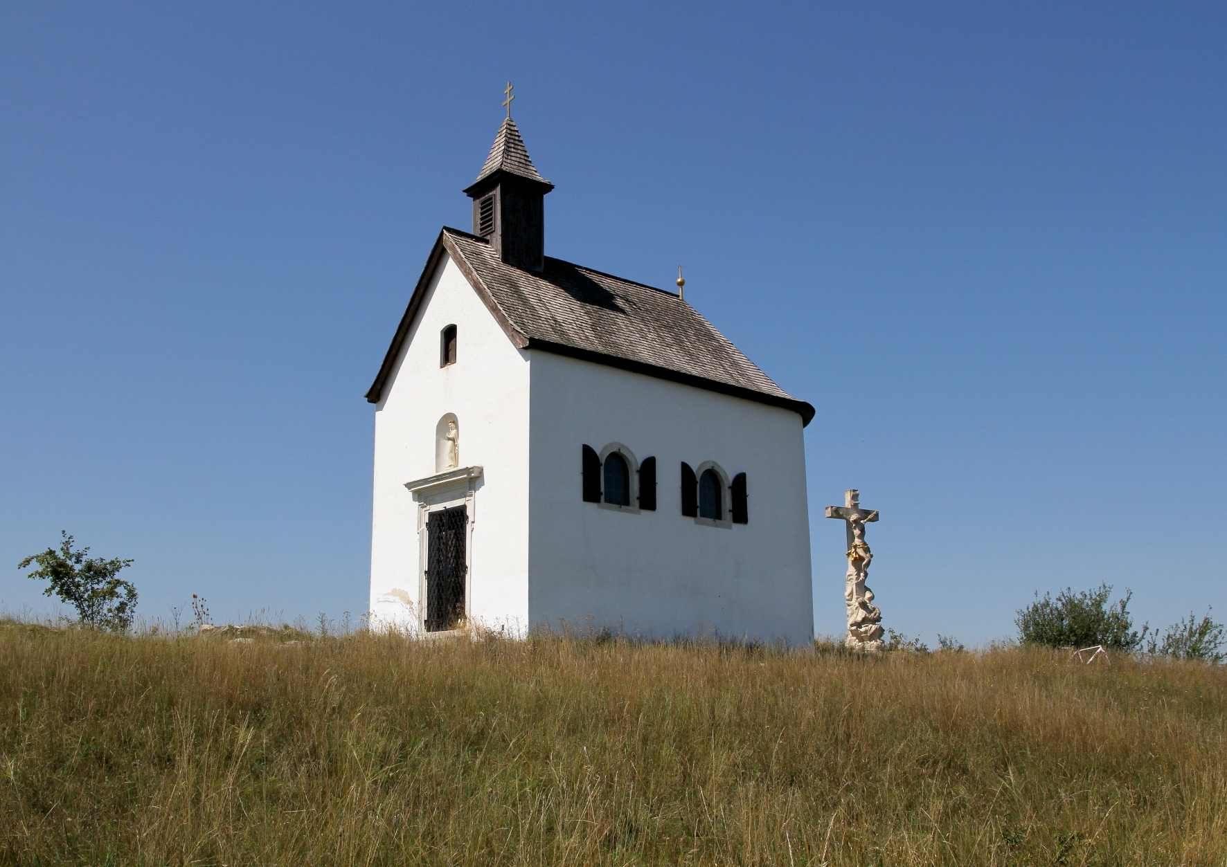 Eine kleine Kapelle auf einer Anhöhe nächst der Oggauer Landesstraße in der burgenländischen Marktgemeinde Oggau am Neusiedler See.